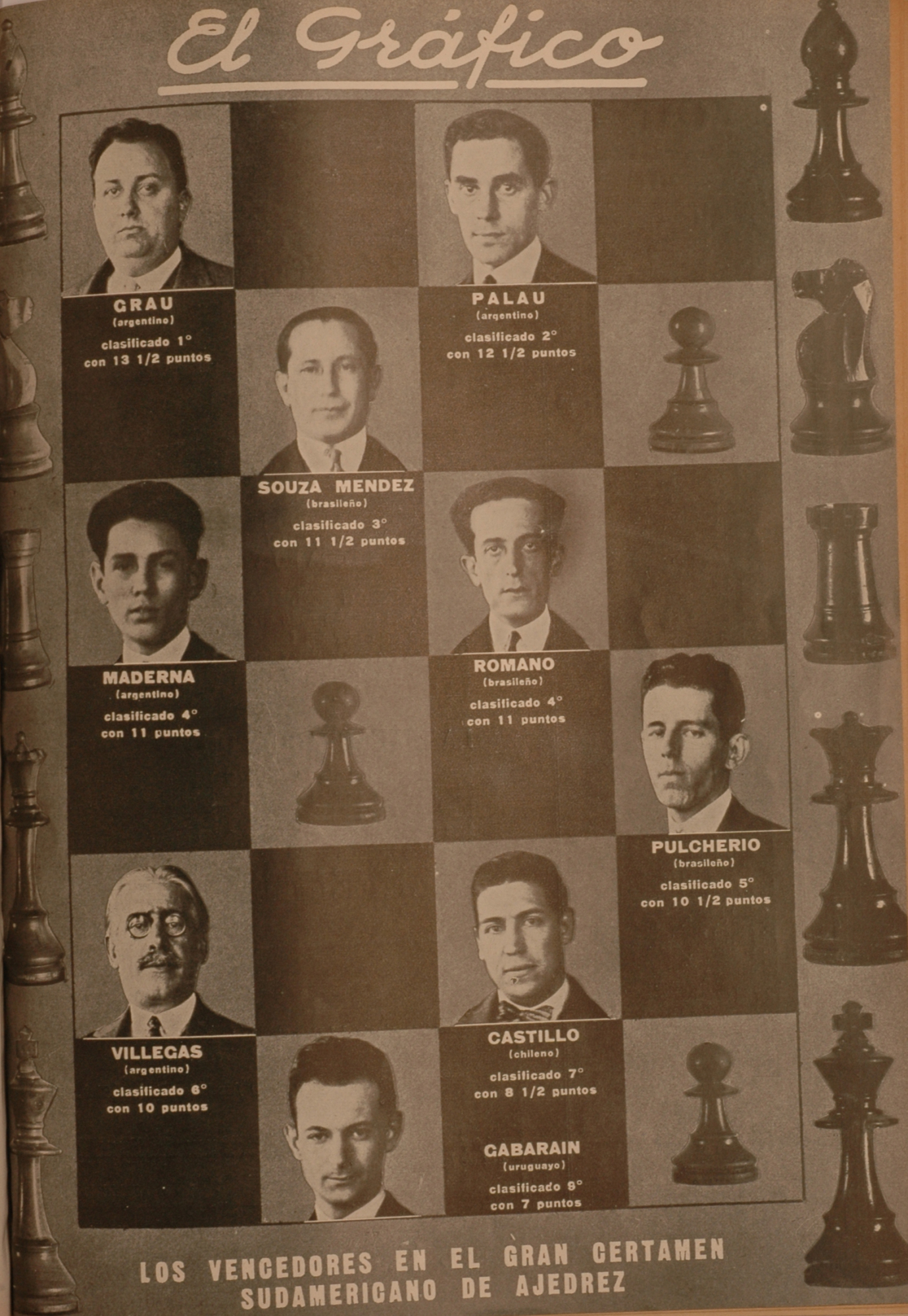 El Grafico del 07 de Abril de 1928. Edicion 457